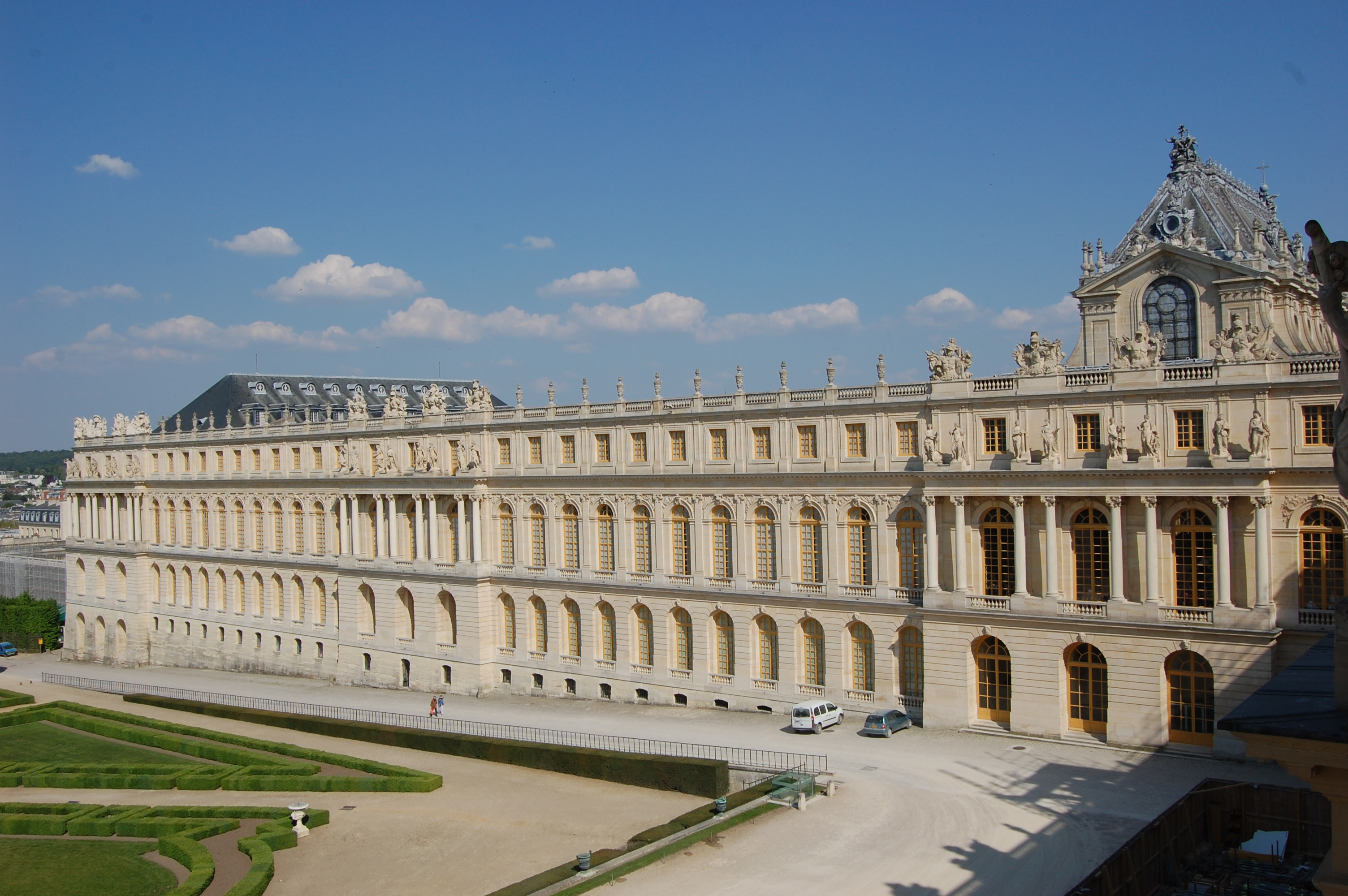 Aile du Nord du château de Versailles vue des appartements de la Pompadour